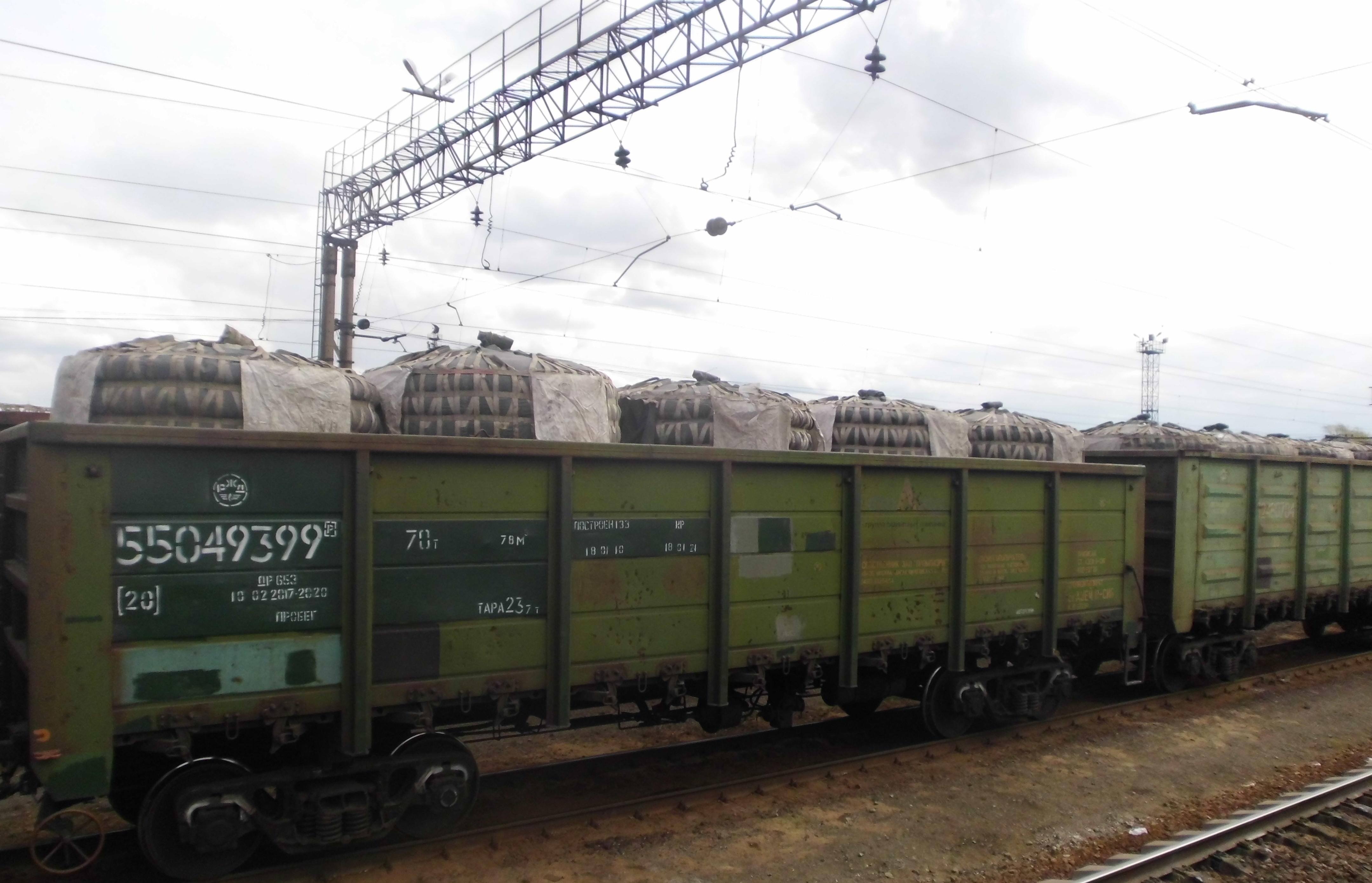 Железнодорожная станция УАЗ, Свердловская железная дорога, г. Каменс-Уральский. Россия. Полувагоны с глинозёмом с Уральского алюминиевого завода.